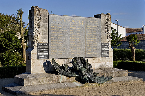 Monument aux morts 1914-1918 - La Couarde - Île de Ré - Photo issue de ma banque d'images